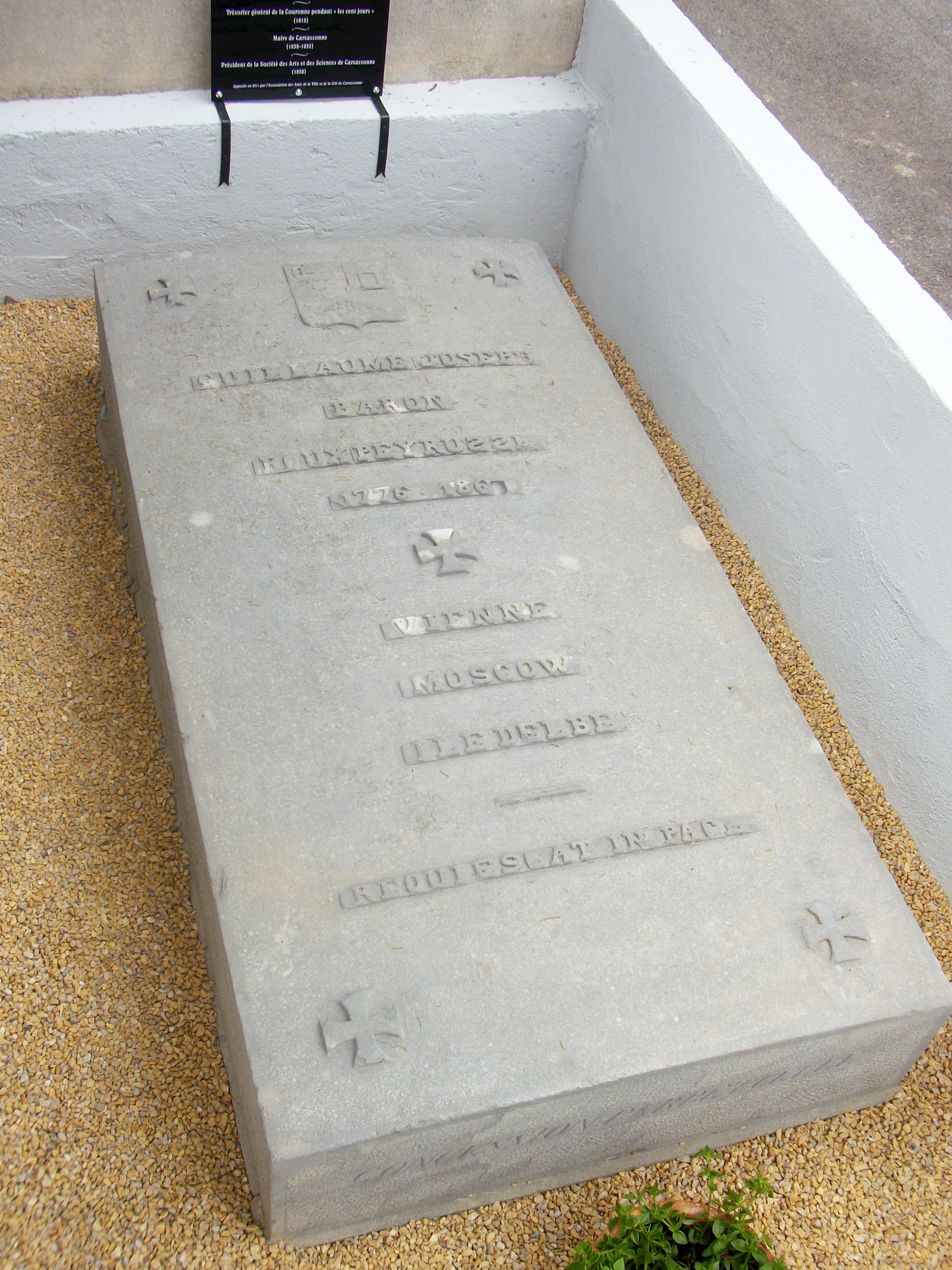 La tombe du baron Guillaume Peyrusse (1776-1860), visible au cimetière Saint-Vincent de Carcassonne.